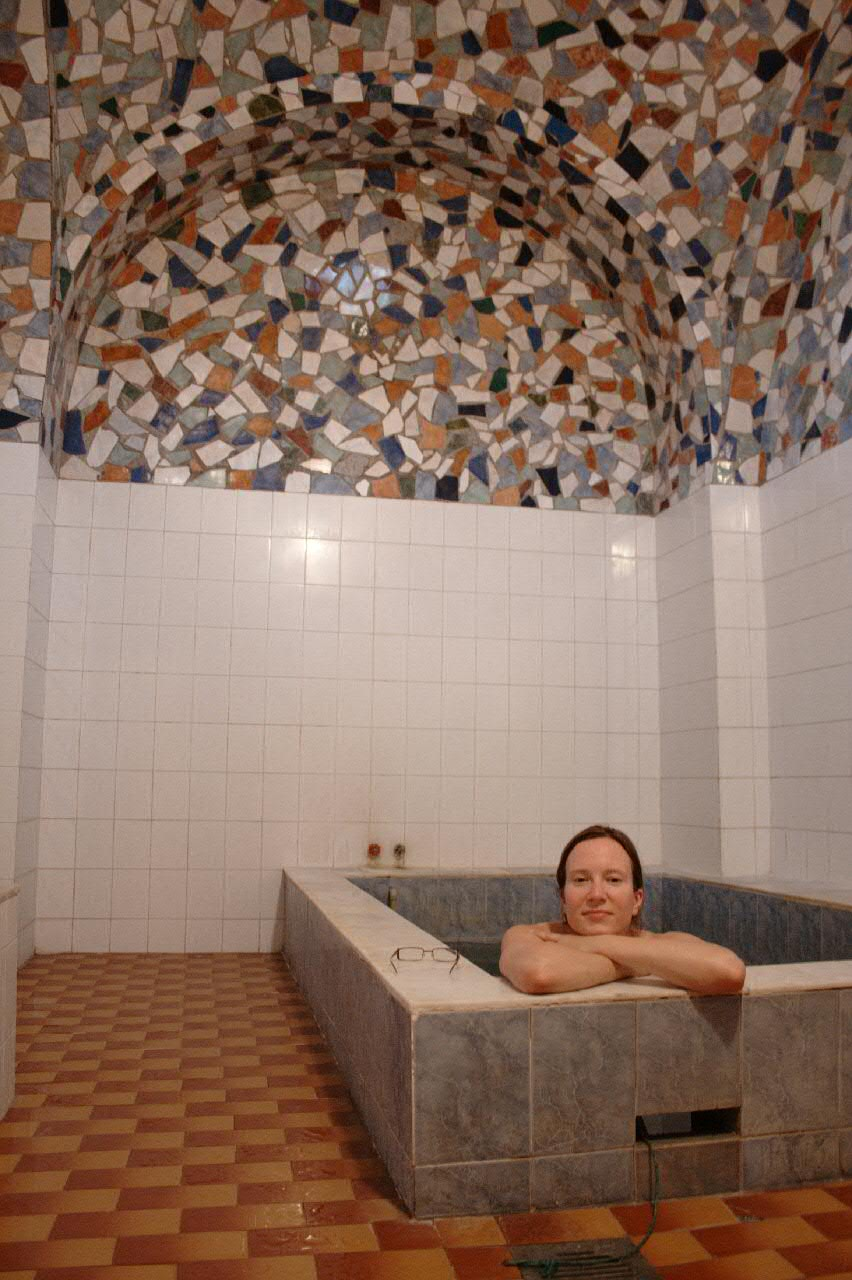 dans les bains